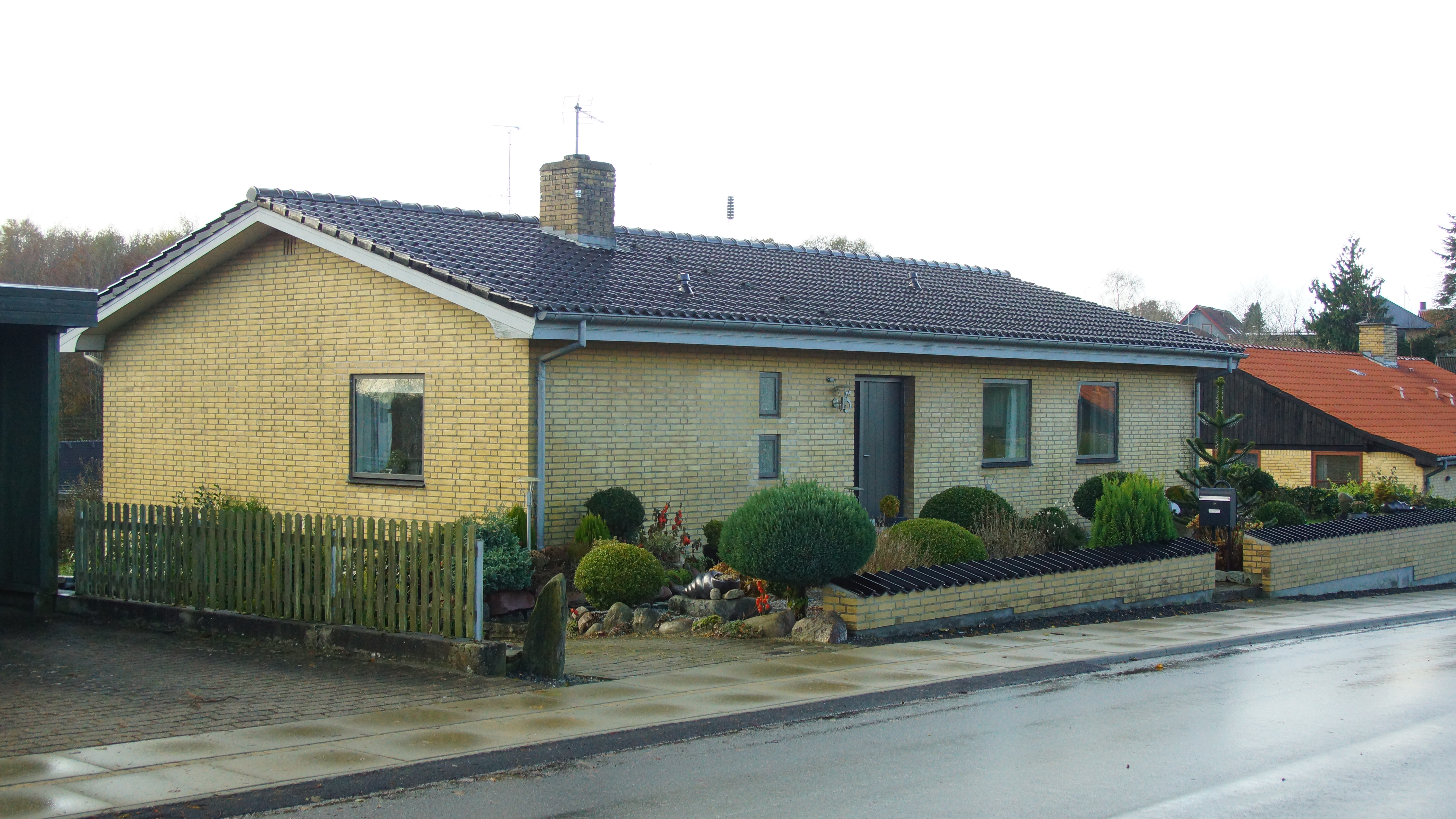 Parcelhus, 70'er byggeri, Ryomgård